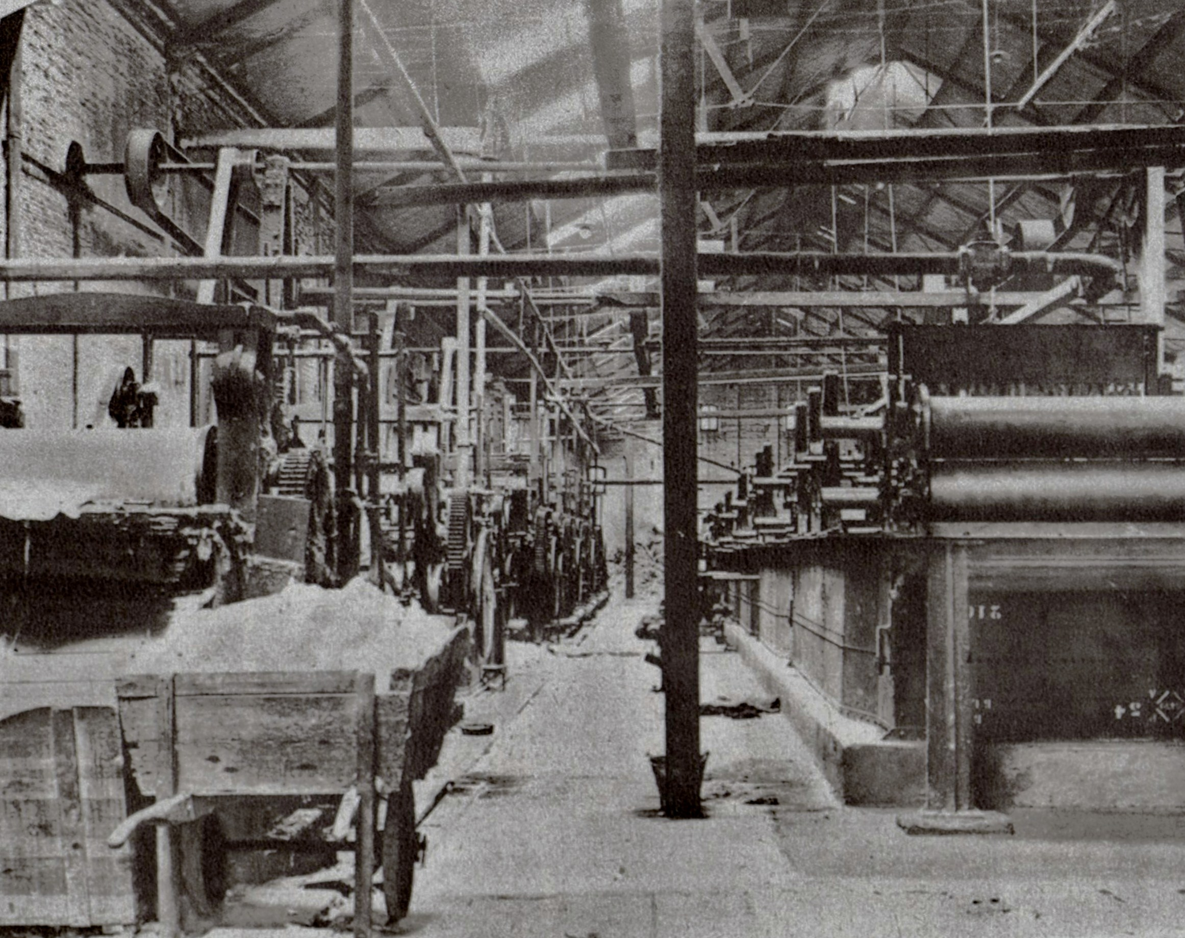 Linea de maquinas de lavado y hornos de secado de lana